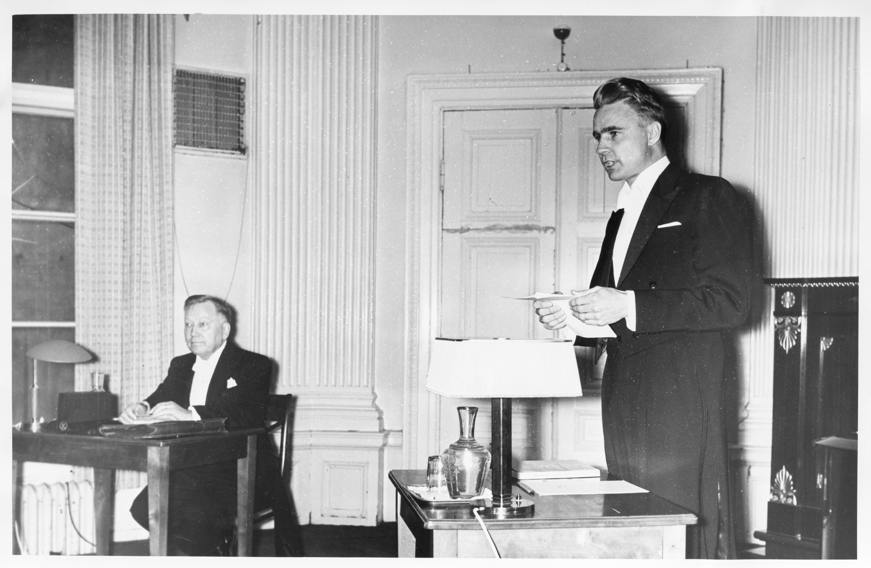 Future doctor of sociology Mauno Koivisto defending his dissertation on 19 September 1956. His supervisor, professor Esko Aaltonen from the University of Turku in the background. --- Presidentti Mauno Koiviston yksityisarkistoa säilytetään Kansallisarkistossa. Lähes 32 hyllymetrin laajuinen kokoelma sisältää runsaasti tietoa koko hänen elämänsä ajalta. Hyvä ilmentymä arkiston laaja-alaisuudesta on siihen sisältyvä 22 kotelon ja kolmen laatikon laajuinen valokuvakokoelma, joka sisältää kuvia ainakin vuosilta 1939-1998. Kuvien ottaja ja ajoitus on valitettavan usein epäselvä - kokoelmassa on niin ammattivalokuvaajien vedoksia kuin myös presidentti Koiviston mahdollisesti itse ottamia kuvia. Tähän nyt julkaistuun kokoelmaan on valittu kuvia hänen nuoruusvuosiltaan. Arkiston käyttöön vaaditaan Kansallisarkiston pääjohtajan lupa. Lisätietoa arkistosta löytyy Arkistojen Portista ( --- President Mauno Koivisto's private archive is preserved at the National Archives of Finland. The size of the collection is almost 32 shelf metres, containing a wide range of information regarding him and his life. A good example of the wide scope of the private archive can be seen in the collection of photographs contained within (25 containers in total). The collection contains photos at least from the years 1939 to 1998, and includes prints by professional photographers as well as photos possibly taken by president Koivisto himself. Sadly, the photographer, time and place are seldom mentioned. The collection presented here contains photos from his youth. Access to the archive requires written permission from the Director General of the National Archives.